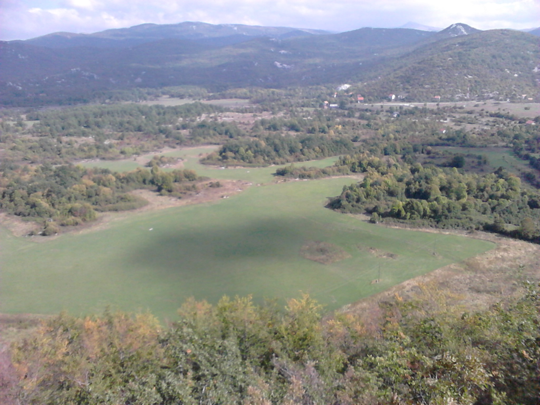 Gračac